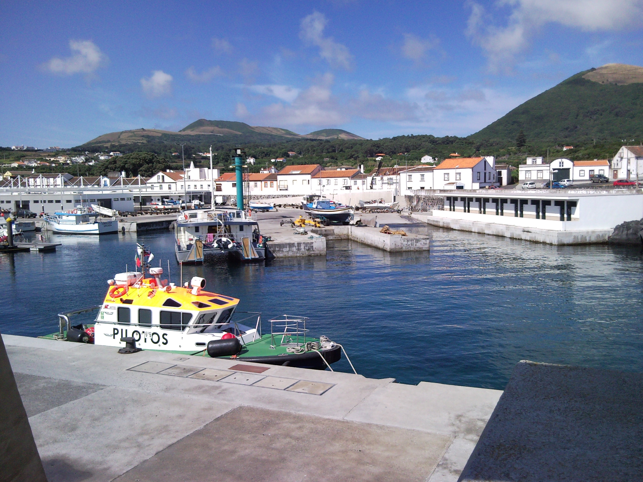 Vista parcial da Vila da Praia, ilha Graciosa, Açores, Portrugal